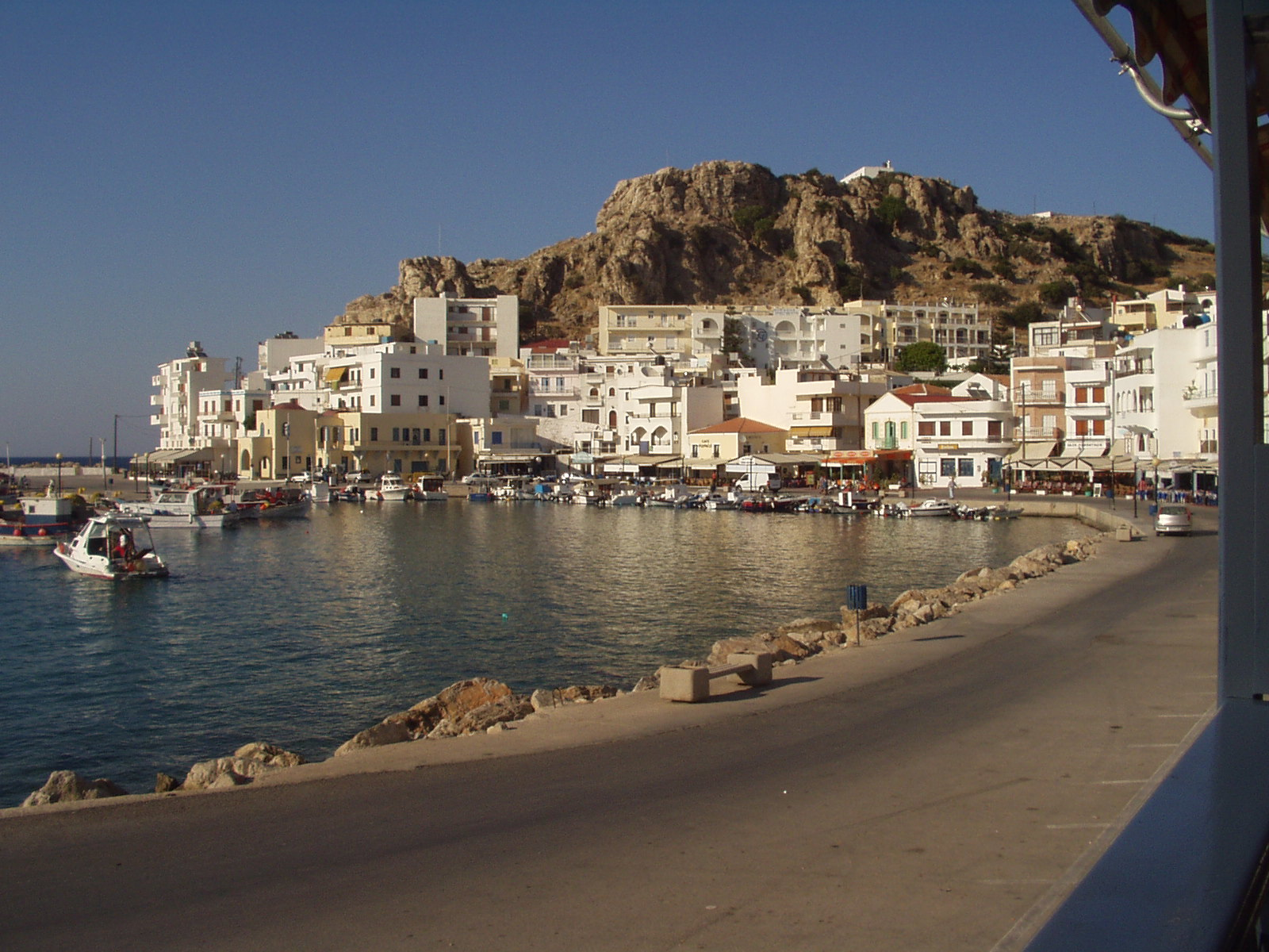 Hafen der Inselhauptstadt Pigadia